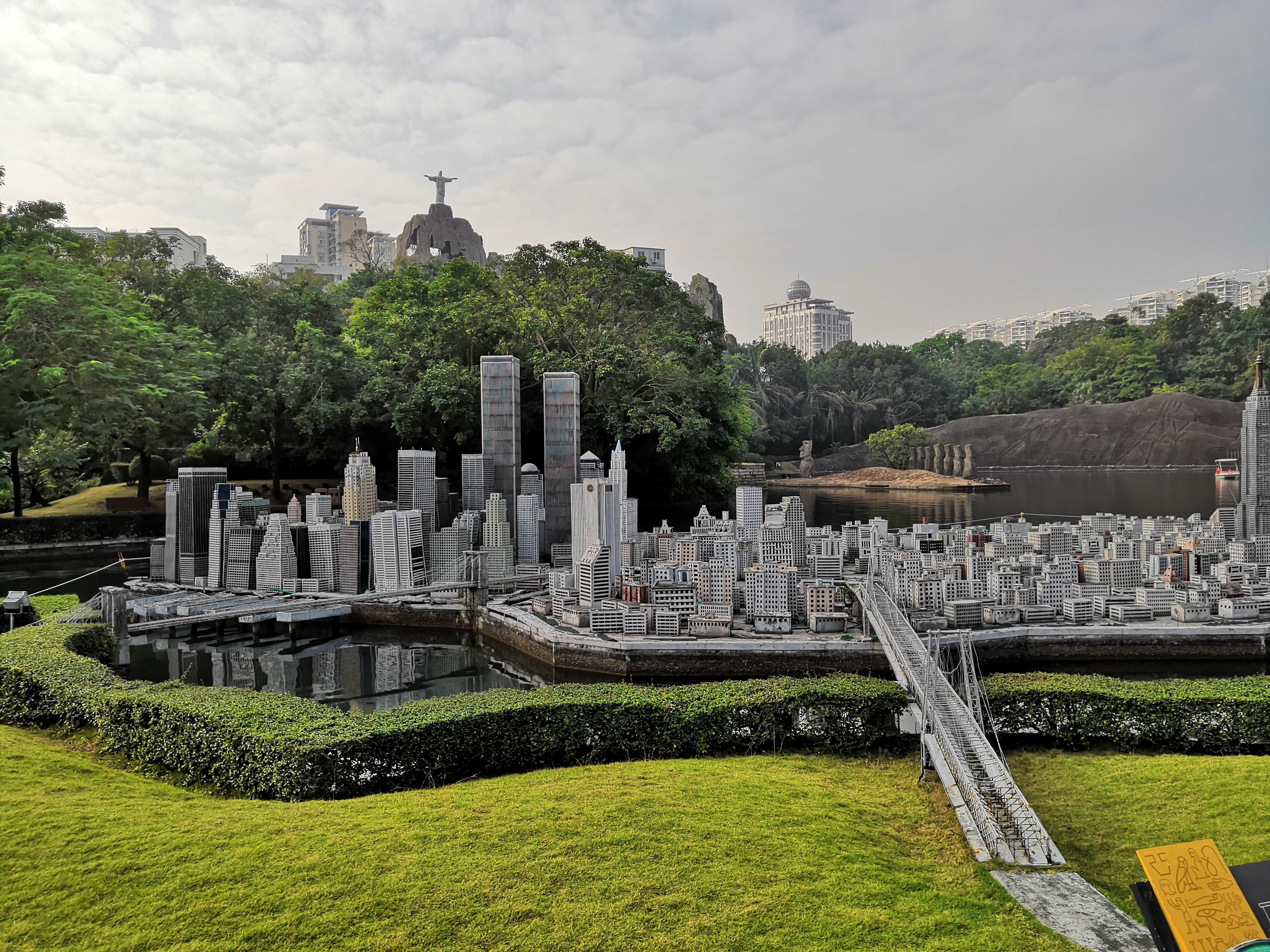 中文（中国大陆）: 深圳 世界之窗